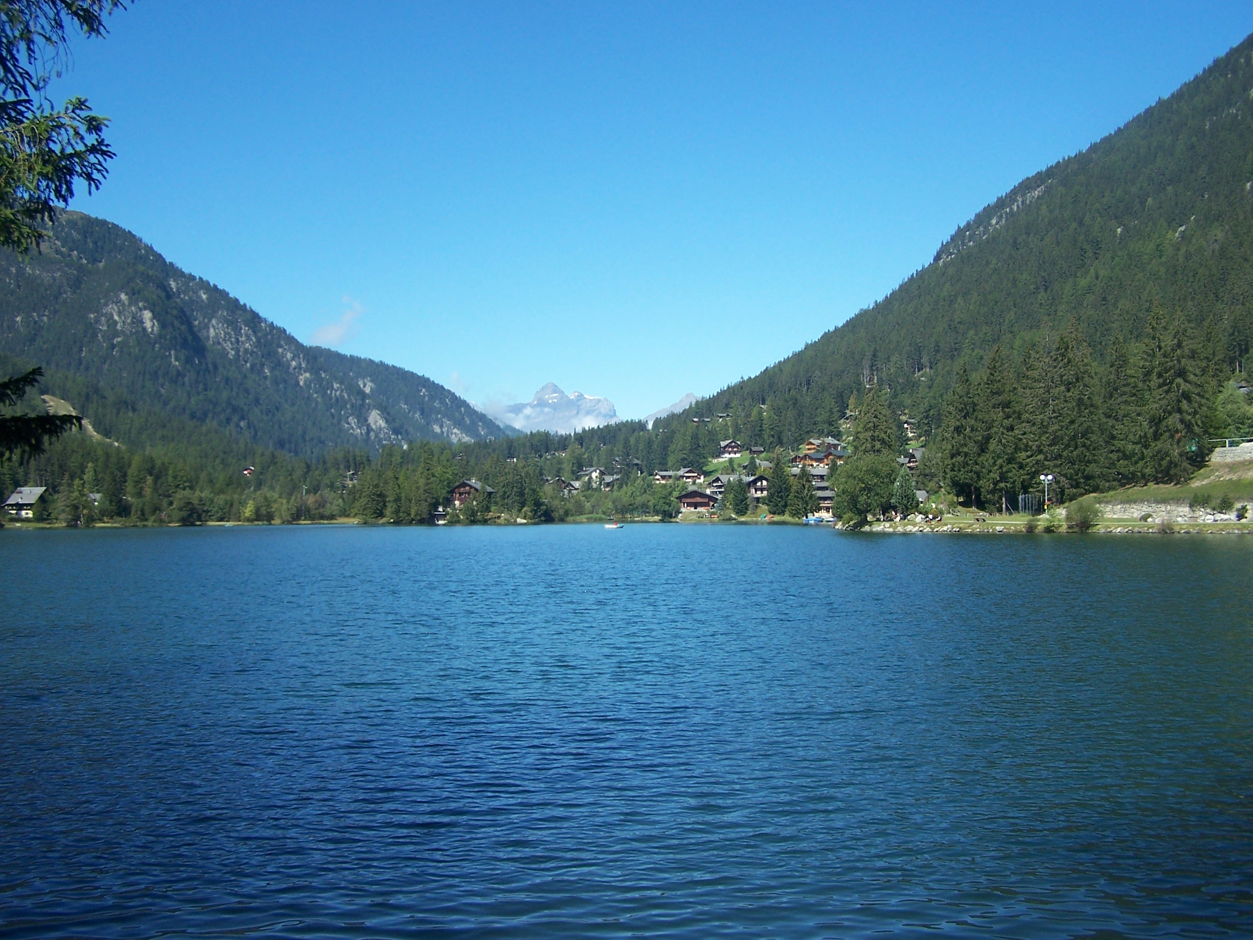 Champex Lac (Wallis, Schweiz)